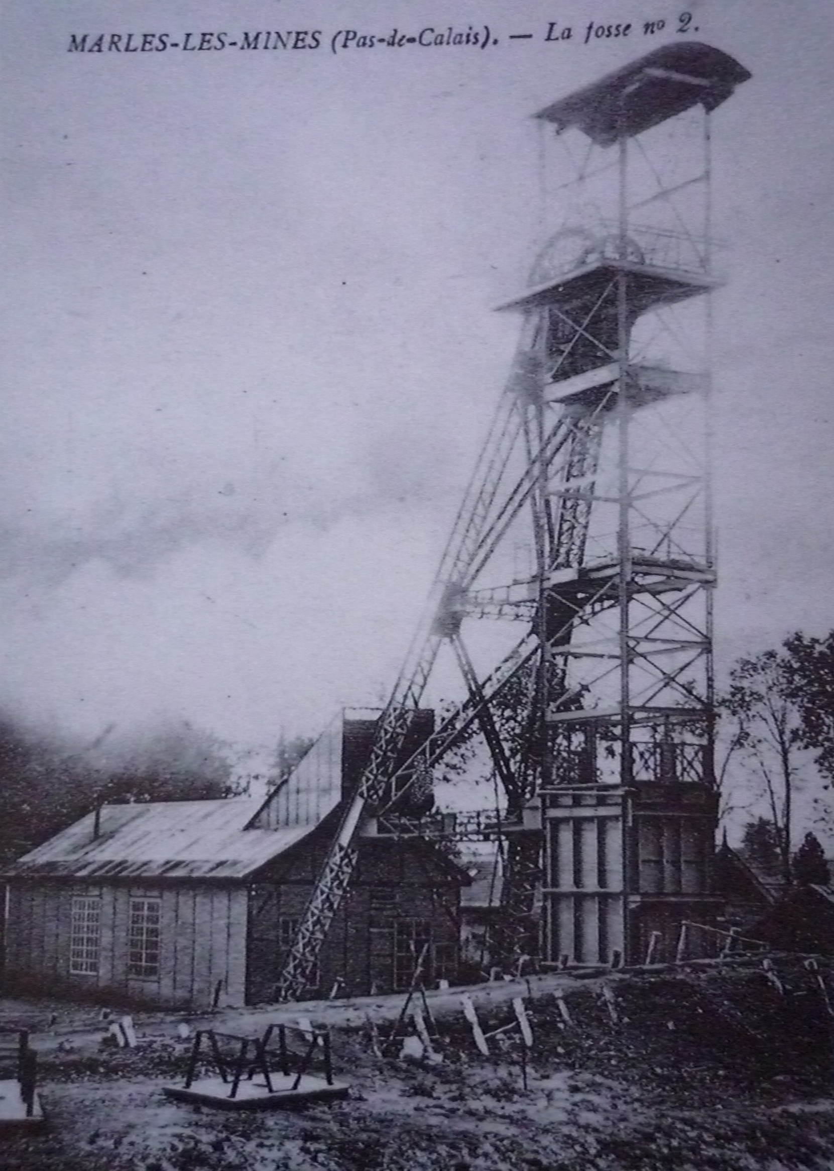 La fosse no 2 dite Saint-Émile de la Compagnie des mines de Marles était un charbonnage du bassin minier du Nord-Pas-de-Calais constitué d'un seul puits situé à Marles-les-Mines, Pas-de-Calais, Nord-Pas-de-Calais, France. L'avaleresse no 1 est localisée sur le site. Le chevalement de la fosse no 2 avec les parties anciennes du bâtiment de la machine d'extraction sont inscrits aux monuments historiques le 6 mai 1992. La fosse est également inscrite sur la liste du patrimoine mondial par l'Unesco le 30 juin 2012 et y constitue le site no 101.